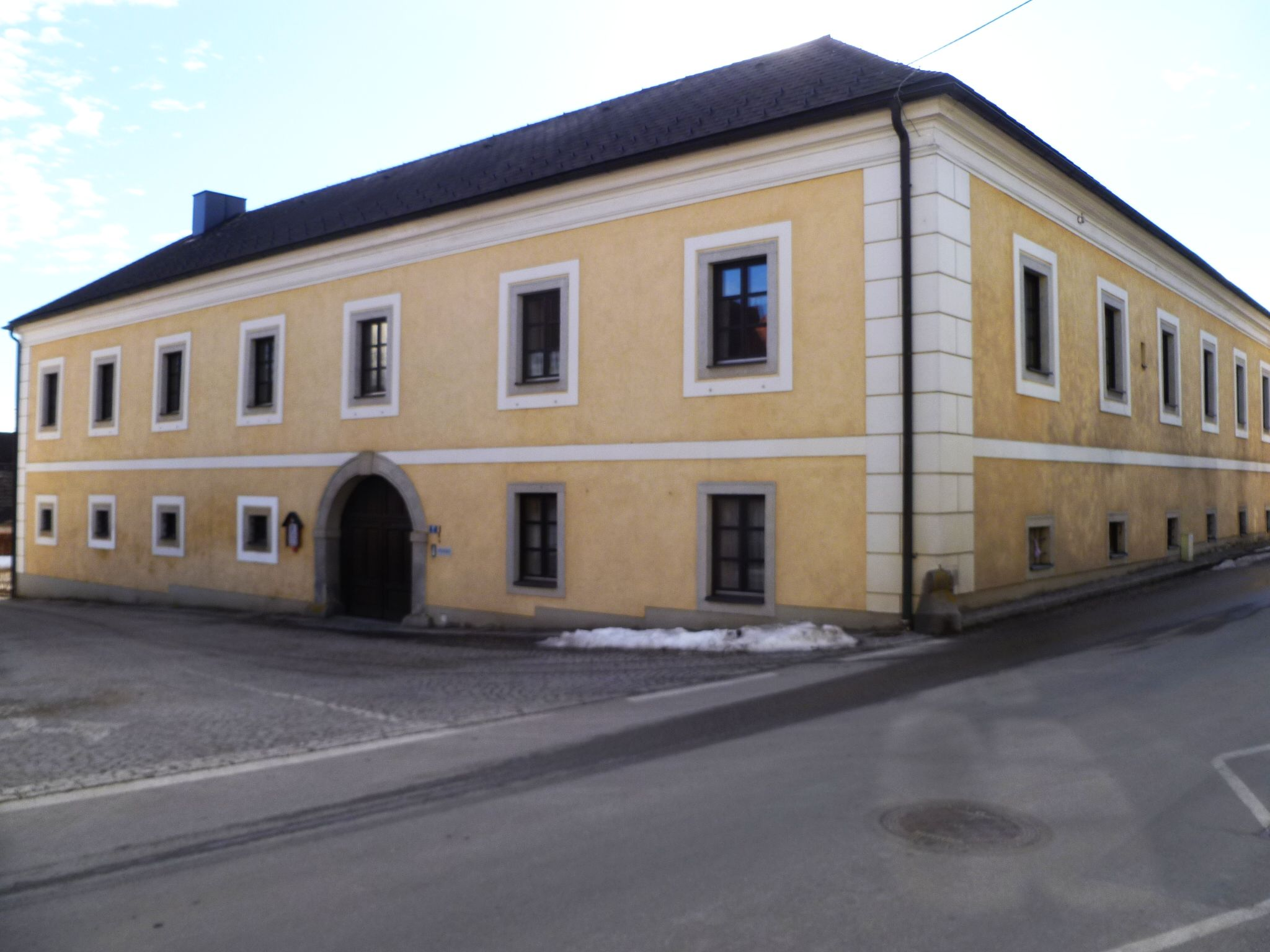 Pfarrhof Lasberg - ehemalige Burg